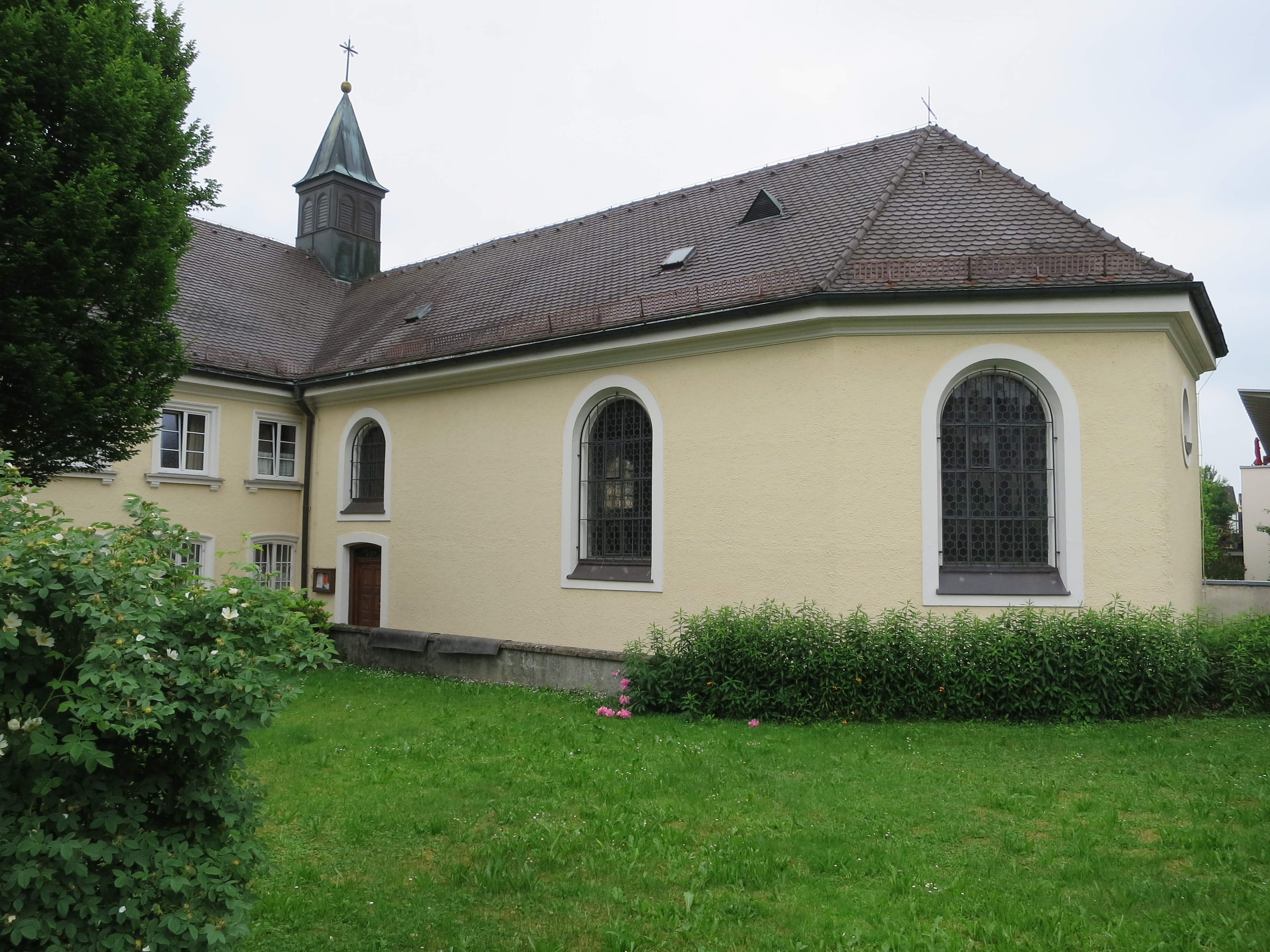 Kammergasse 20, Kloster St. Clara (Freising)